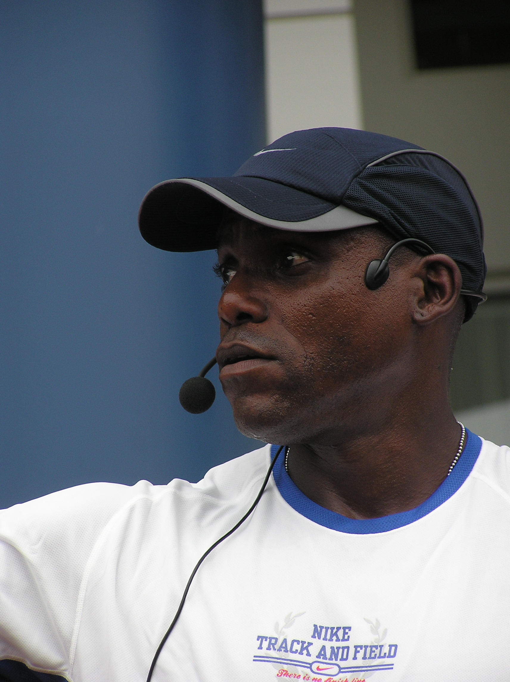 Carl Lewis à Singapour en 2006 Prise en 2006 Mise en ligne le 19 juin 2007